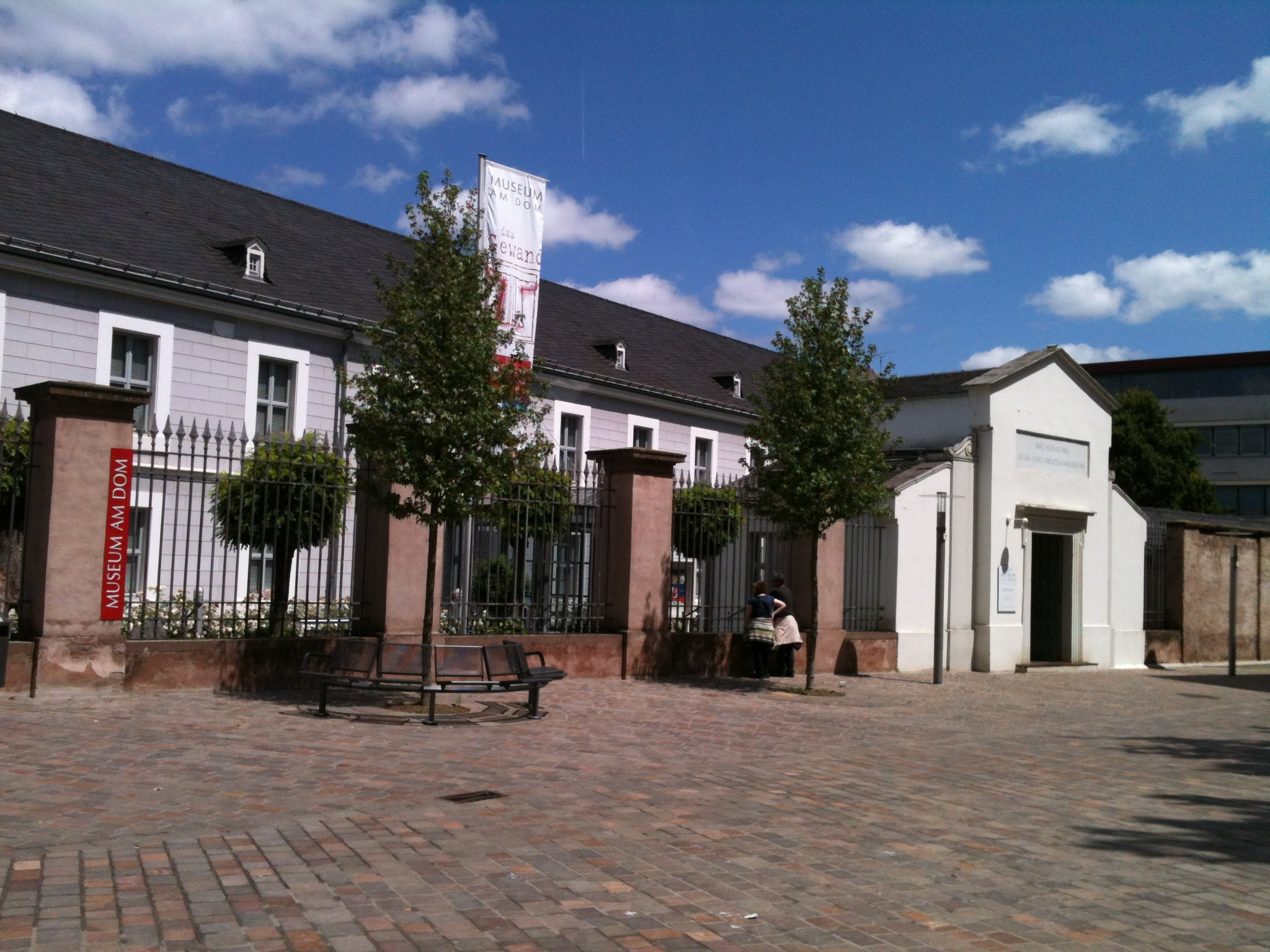 Museum am Dom Tier 2012